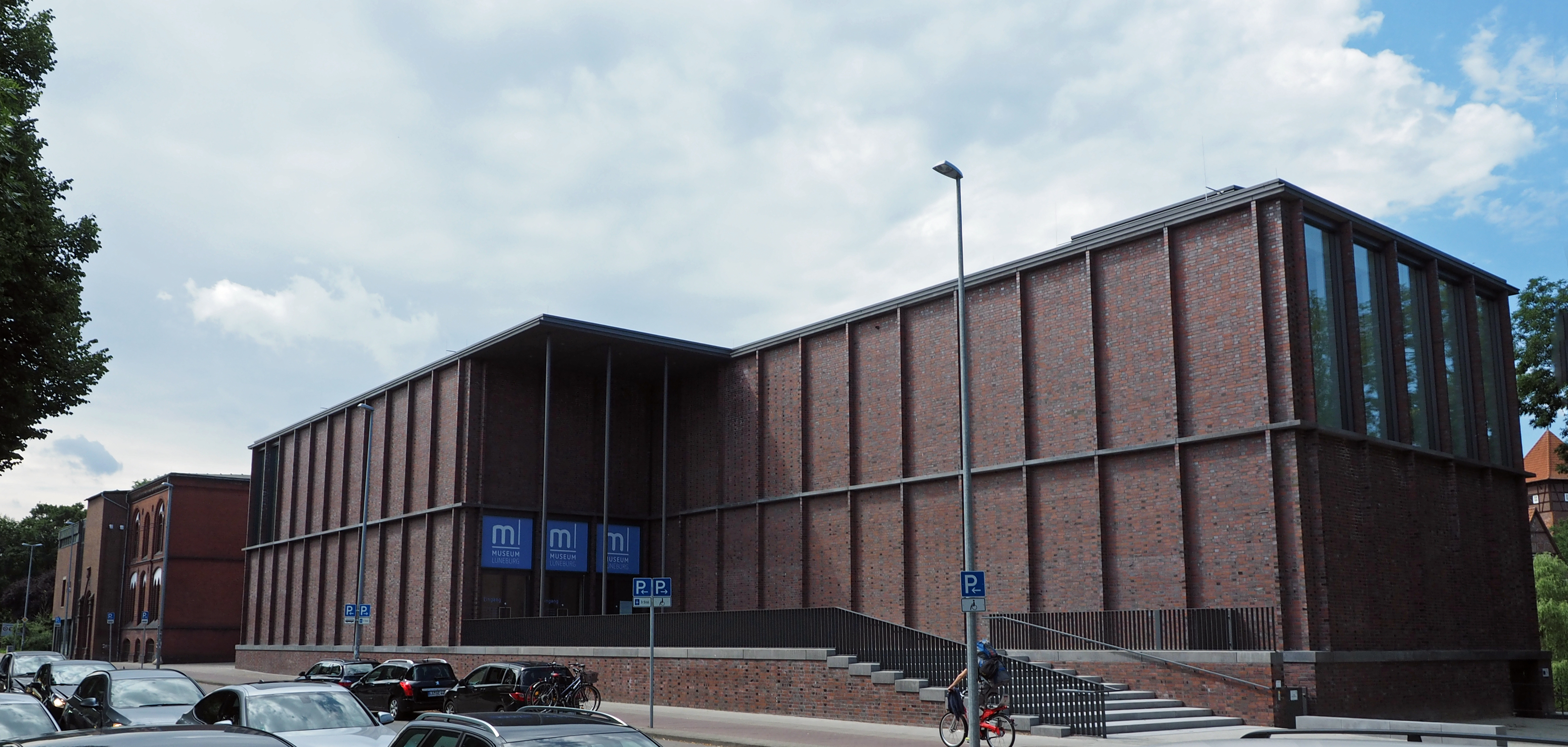 Museum Lüneburg, Willy-Brandt-Str. 1, Lüneburg